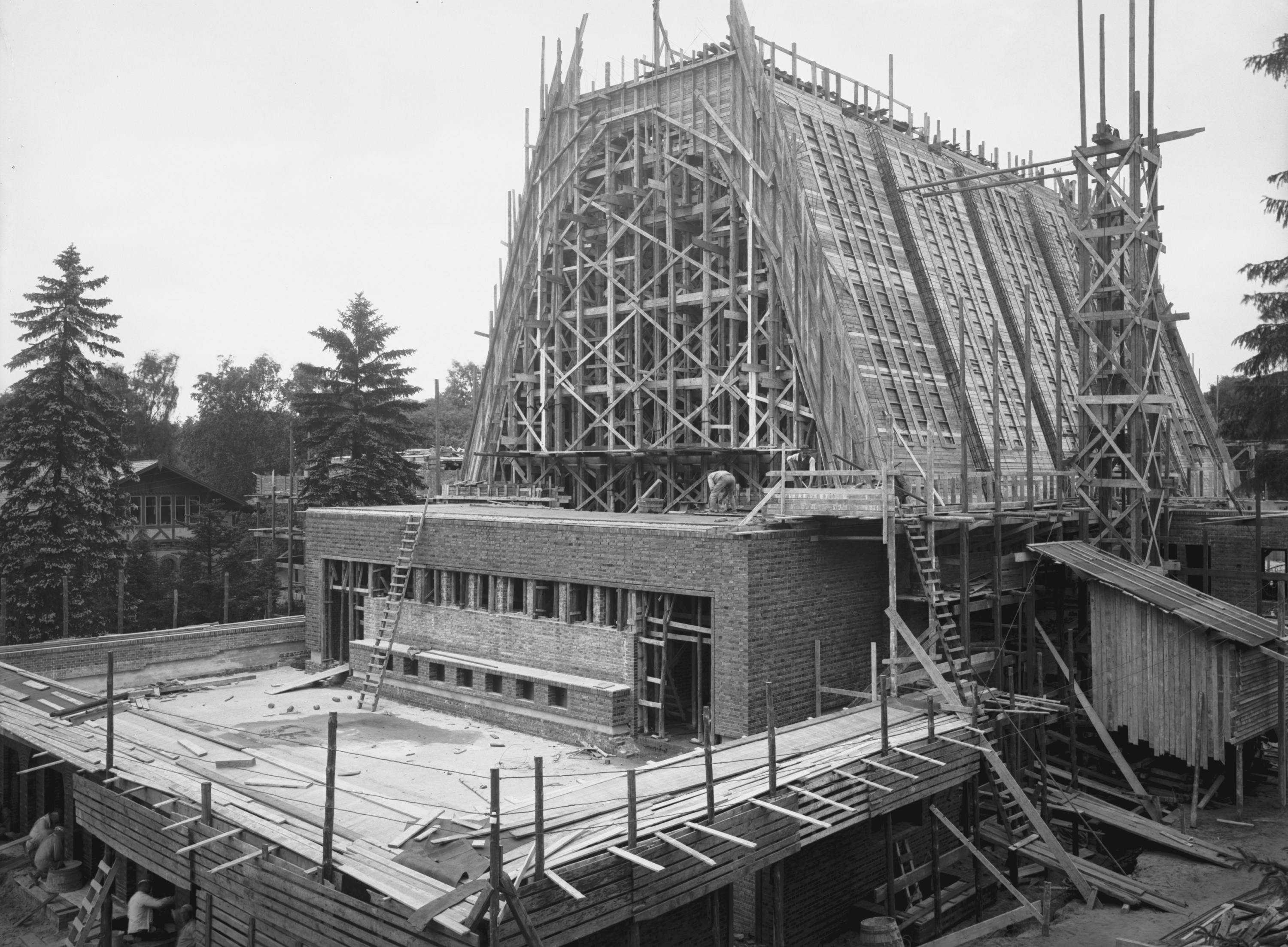 Krematorium Ohlsdorf (Hamburg-Ohlsdorf): Aufnahme während des Baues SchumacherWV Nr. 280